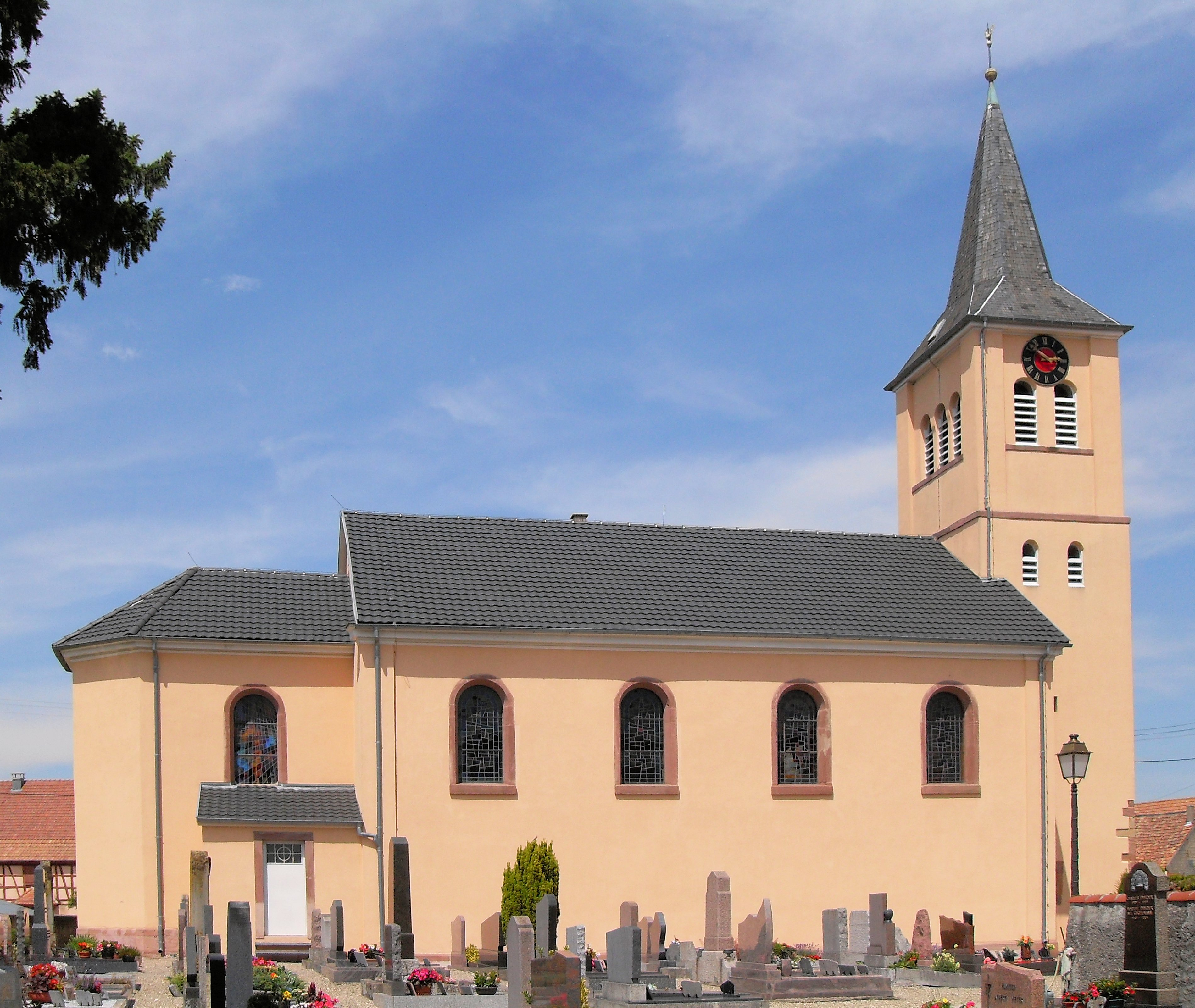 L'église Saint-Blaise à Durrenentzen